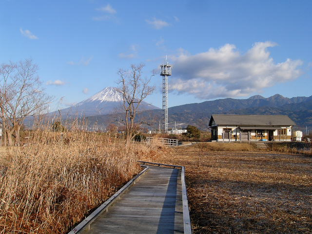 静岡県富士市の浮島自然公園、右側の建物は管理棟